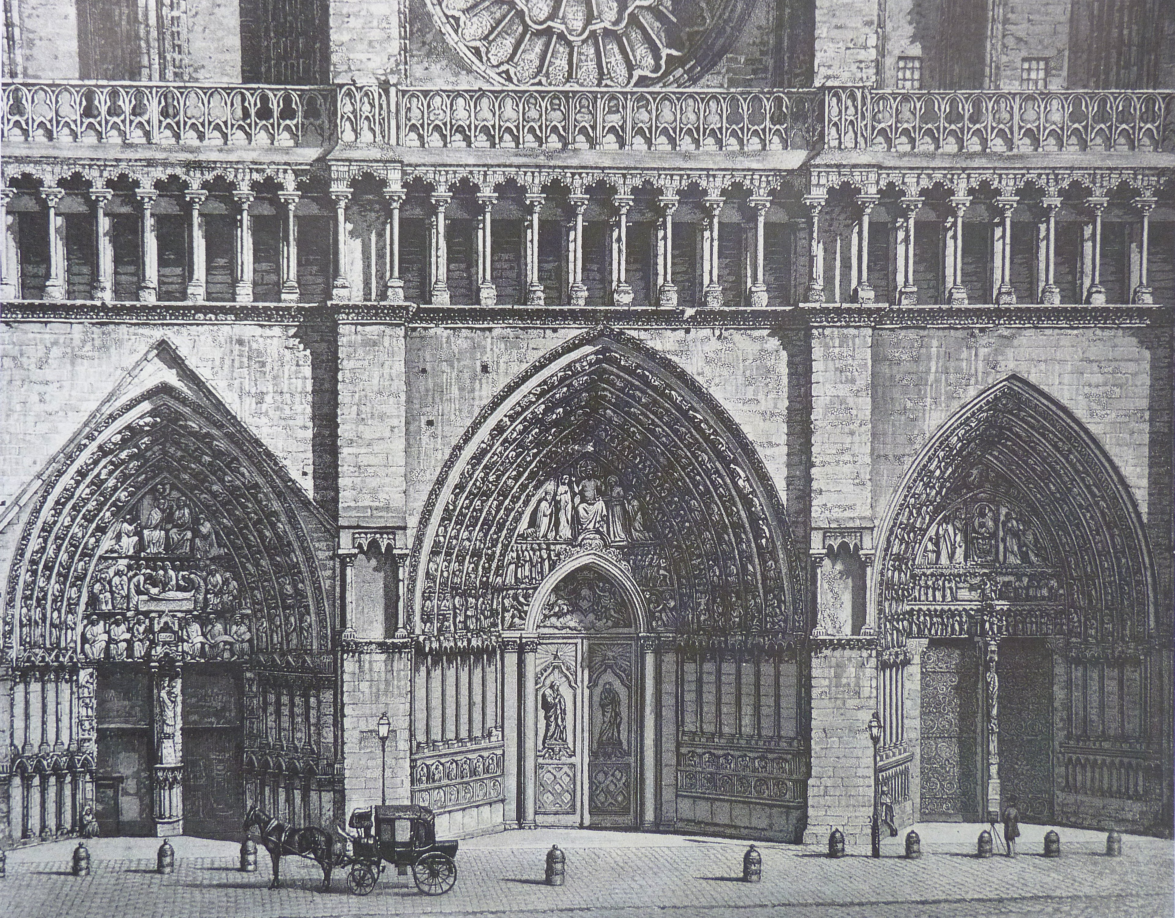 Notre-Dame de Paris, les portails et la galerie des rois avant la restauration de Violet-le-Duc. Lithographie d'après un daguerréotype. Musée Notre-Dame.